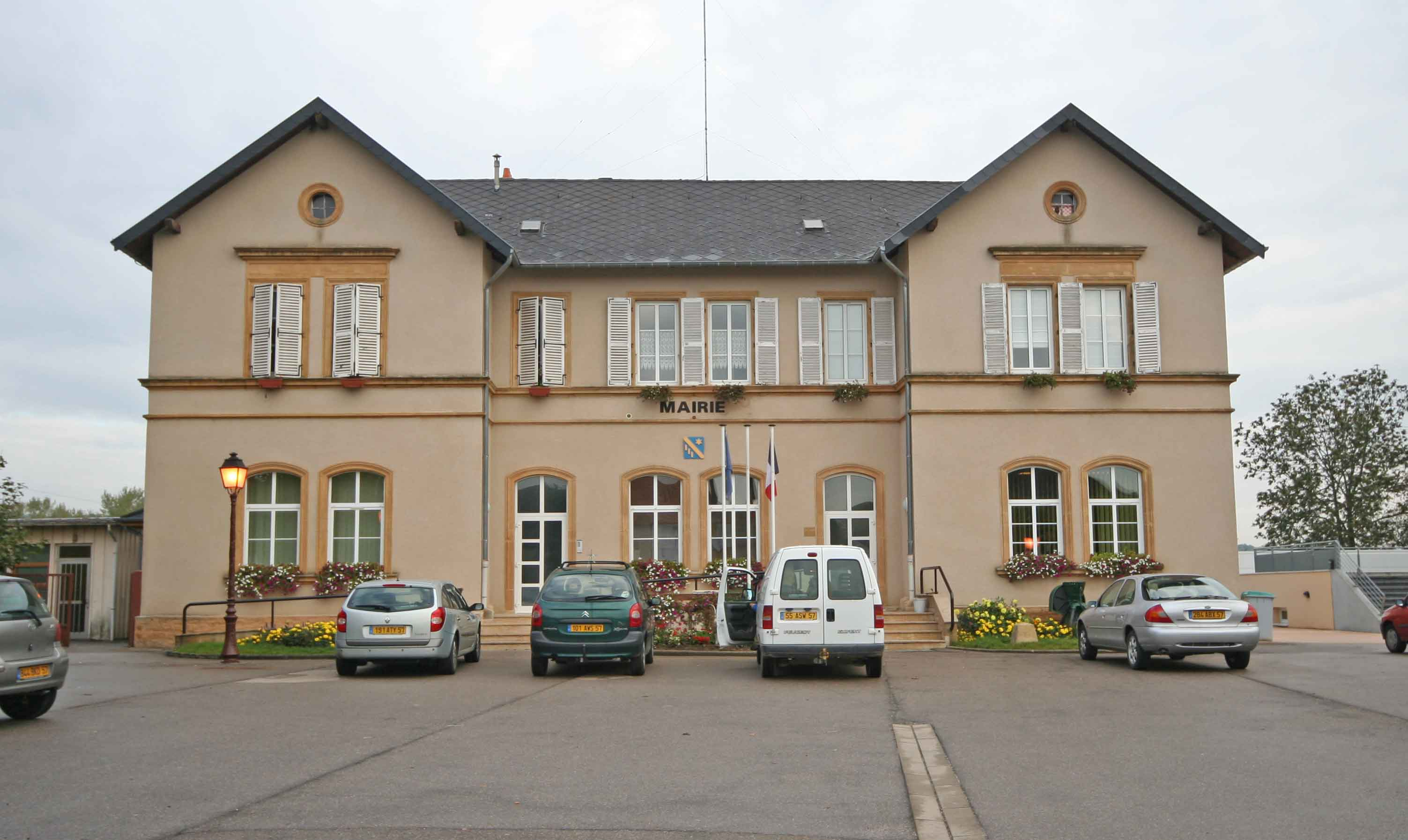 Sujet:Zoufftgen Gemeng Source:Fotograf:lb:User:Cornischong Lizenz